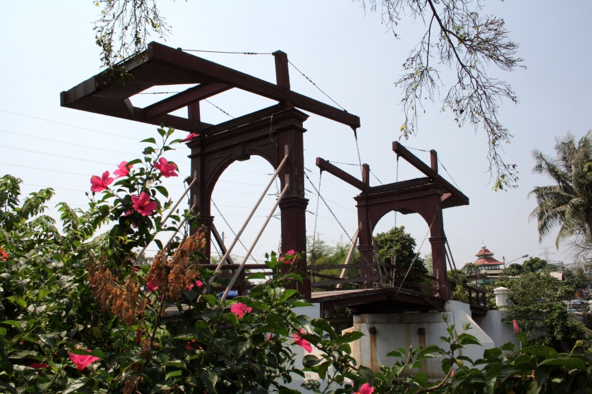 Jembatan Kota Intan in Jakarta (old Dutch drawbridge)